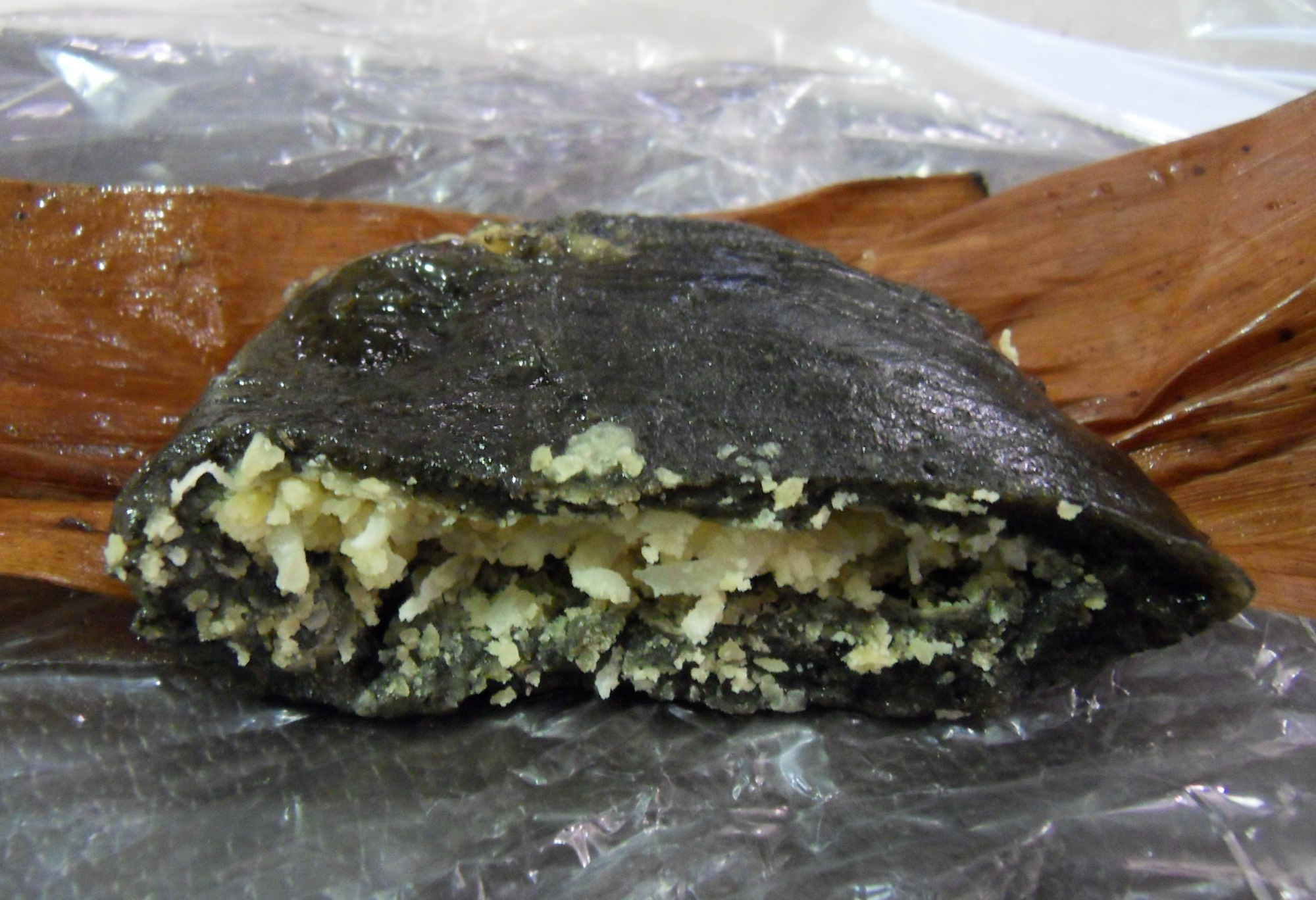 gâteau Kha Nom Phane, spécifique de la province laotienne de Khammouane